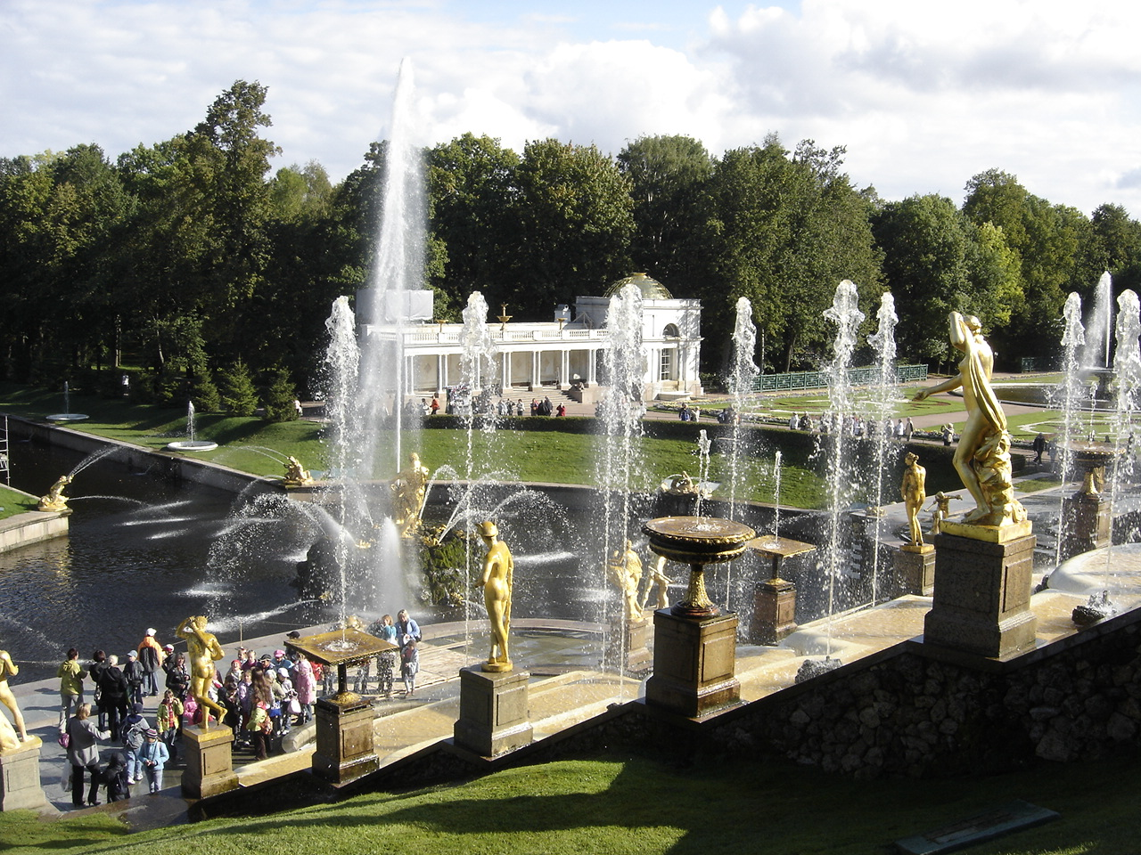 Jardins de Peterhof